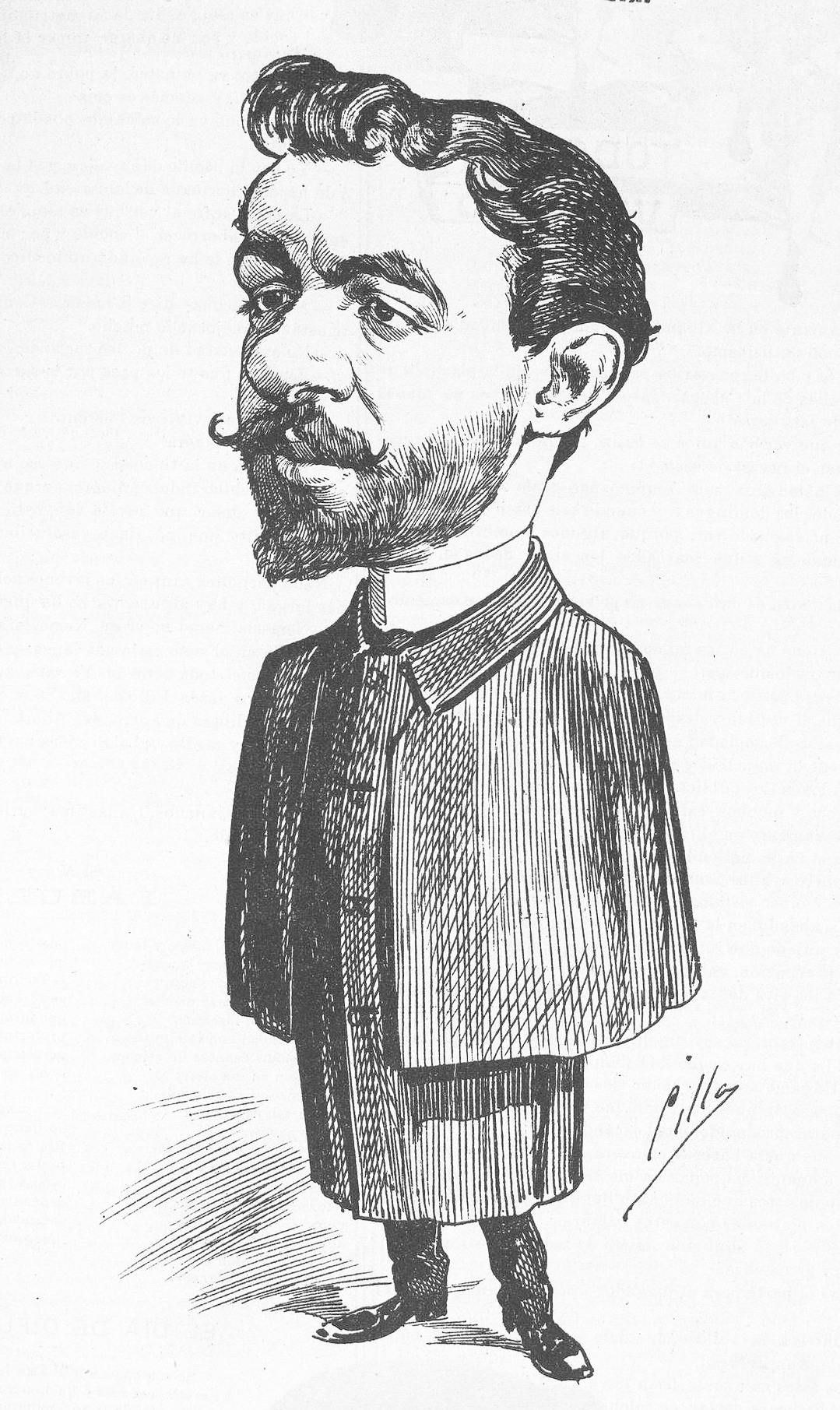 Celso Lucio.